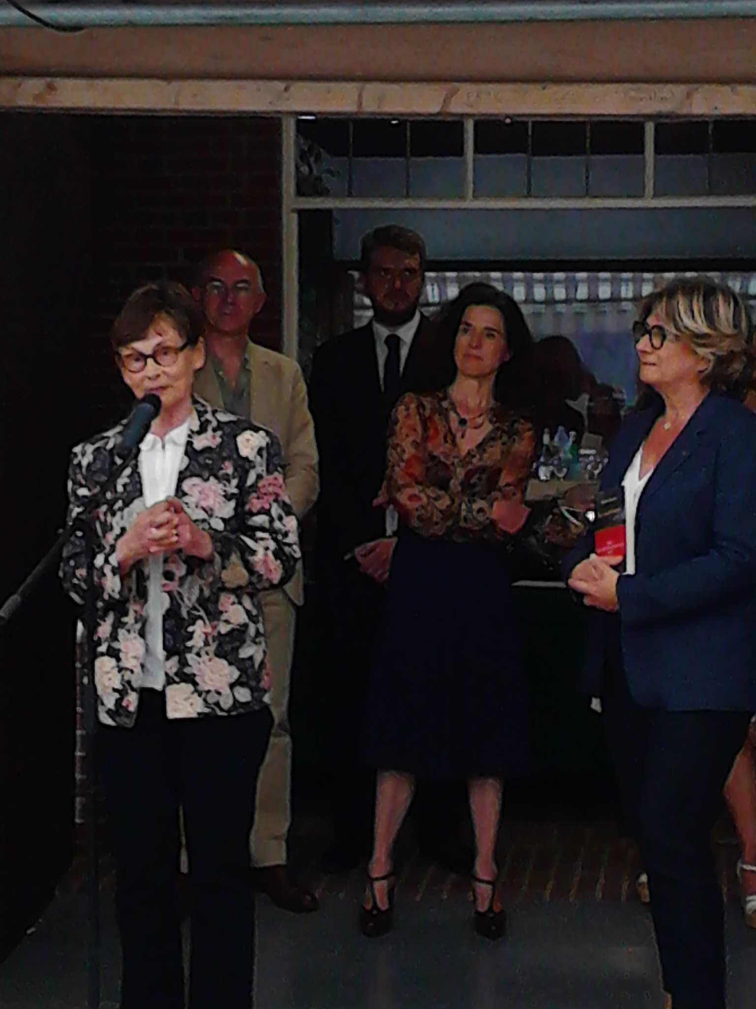 Prix Maurice Genevoix, 2019